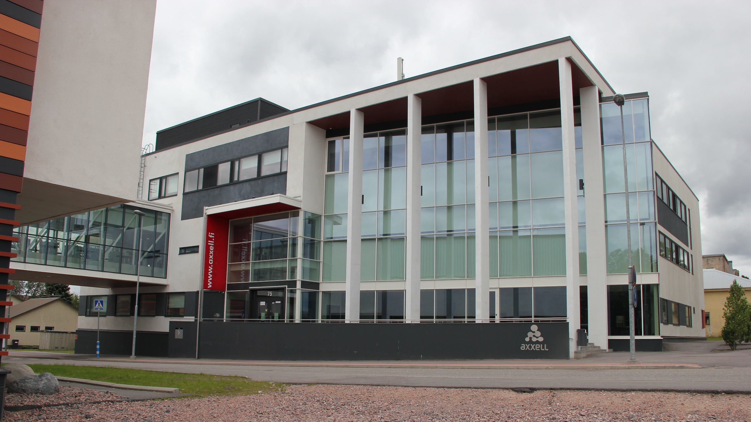 Axxell, koulutuskeskus, Karjaa